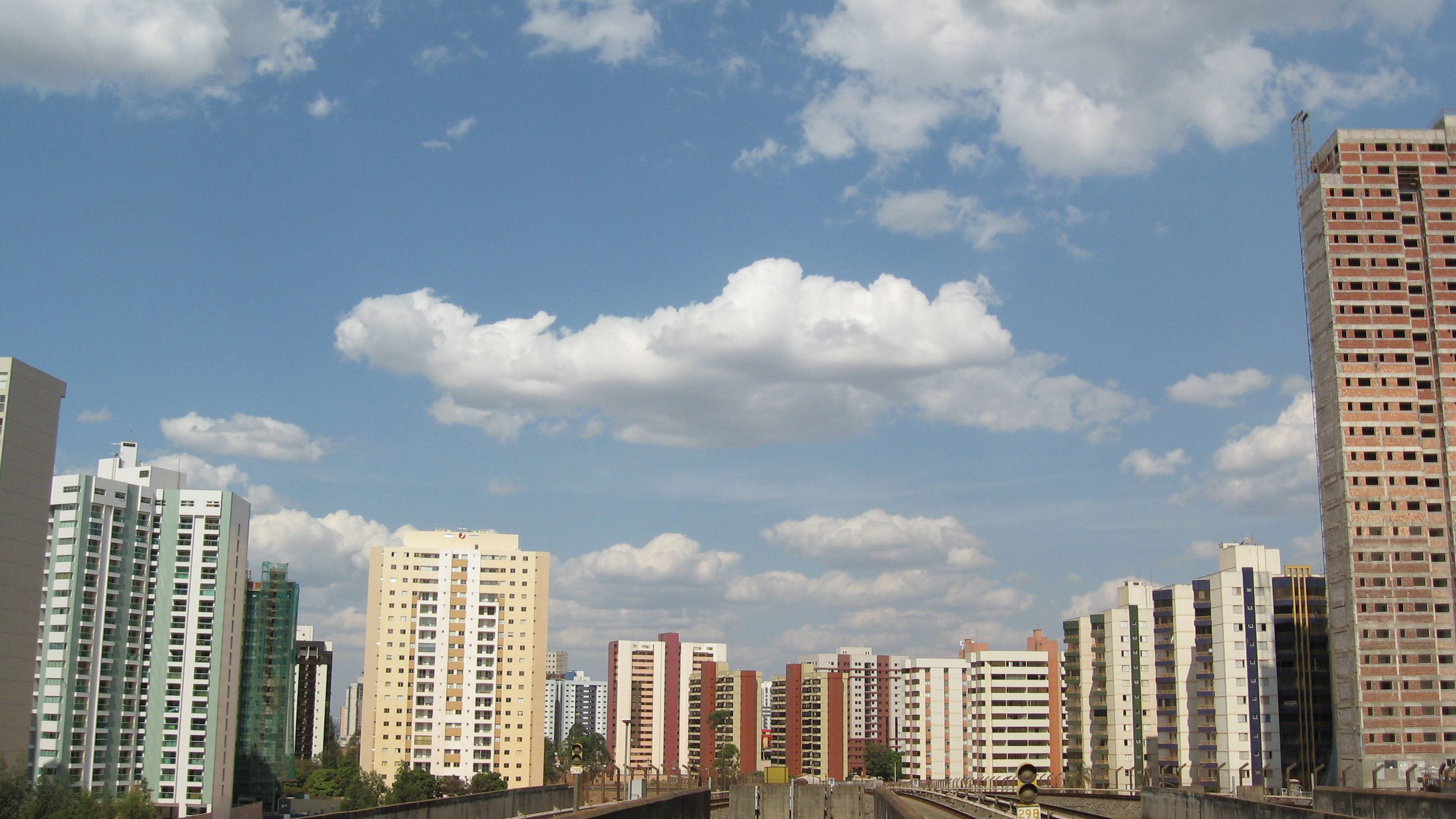 Vista parcial de Águas Claras, DF, Brasil